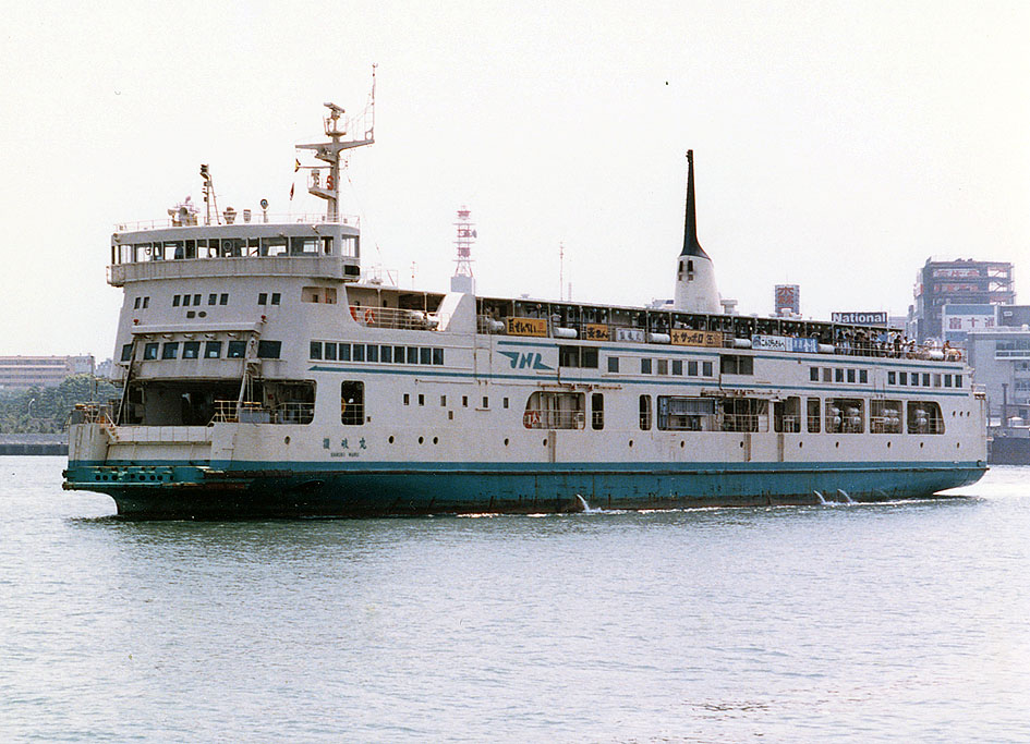 国鉄 宇高連絡船 讃岐丸